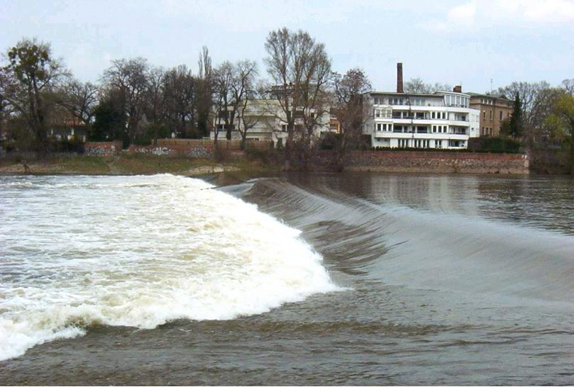 Cracauer Wasserfall an der Alten Elbe in Magdeburg, hoher Wasserstand